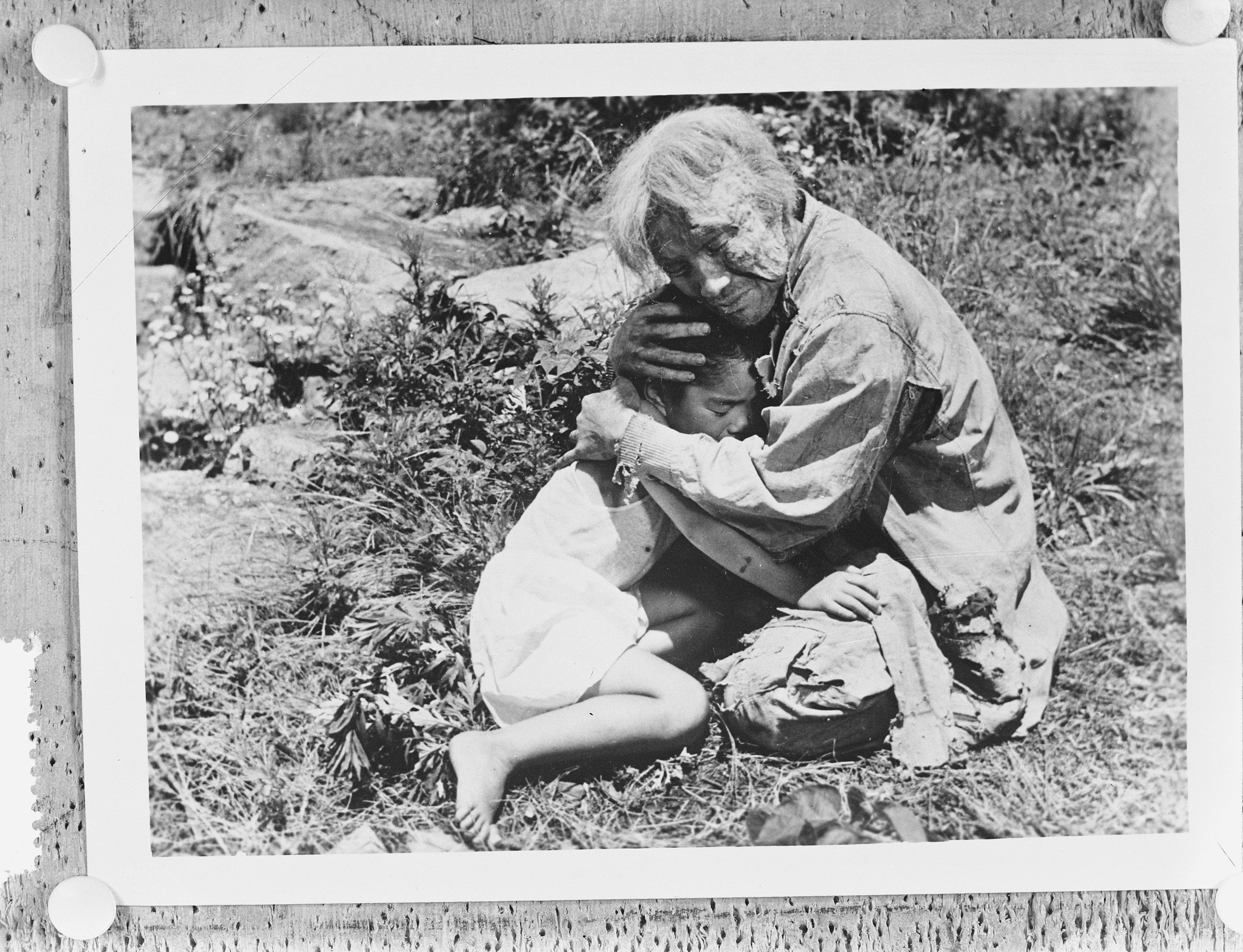 Collectie / Archief : Fotocollectie Anefo Reportage / Serie : [ onbekend ] Beschrijving : Reprodukties Hiroschima (Royal Film) Datum : 4 maart 1954 Locatie : Hiroshima Trefwoorden : FILM, Reprodukties Persoonsnaam : ROYAL Fotograaf : Doka / Anefo Auteursrechthebbende : Nationaal Archief Materiaalsoort : Glasnegatief Nummer archiefinventaris : bekijk toegang 2.24.01.09 Bestanddeelnummer : 906-3248